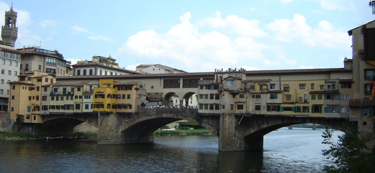 Firenze, Ponte Vecchio, July 2003 Photo